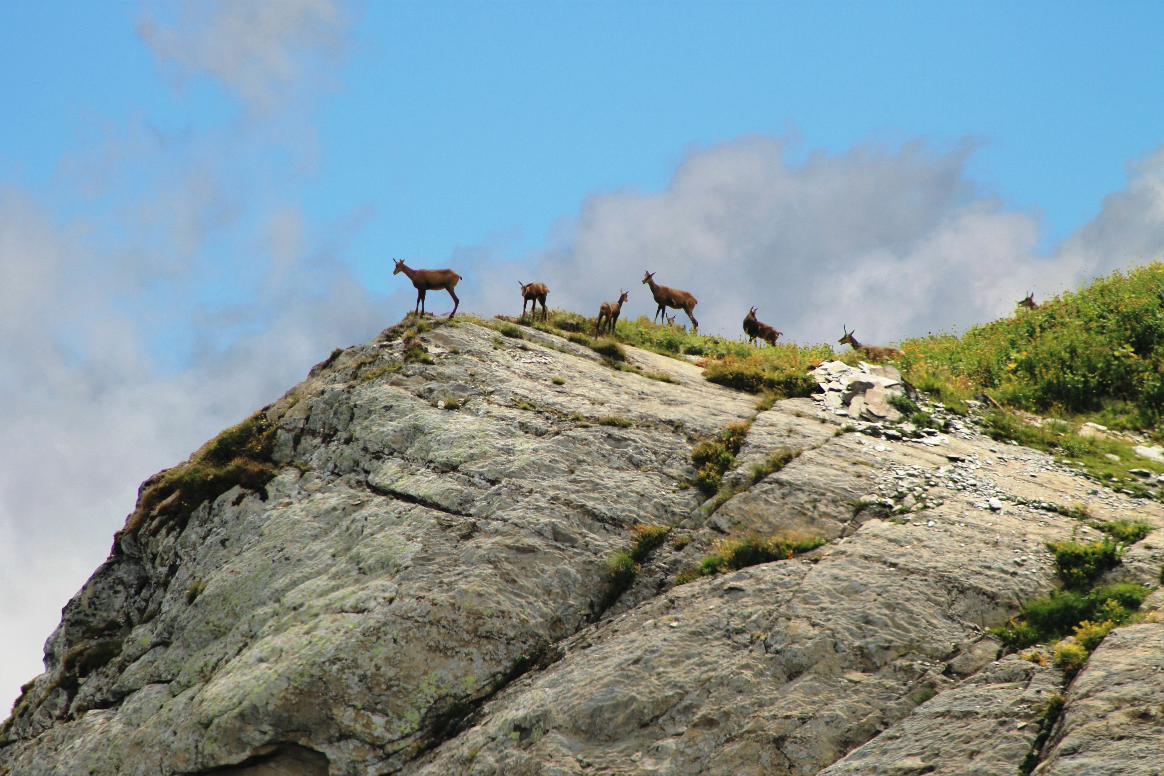 Стадо диких серн на склонах хребта Аибга. Сочинский национальный парк: Сочинский национальный парк расположен на южном склоне Большого Кавказа в Краснодарском крае. This image is related to the protected area of Russia number 2300430